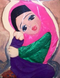 Гекчак Фатма